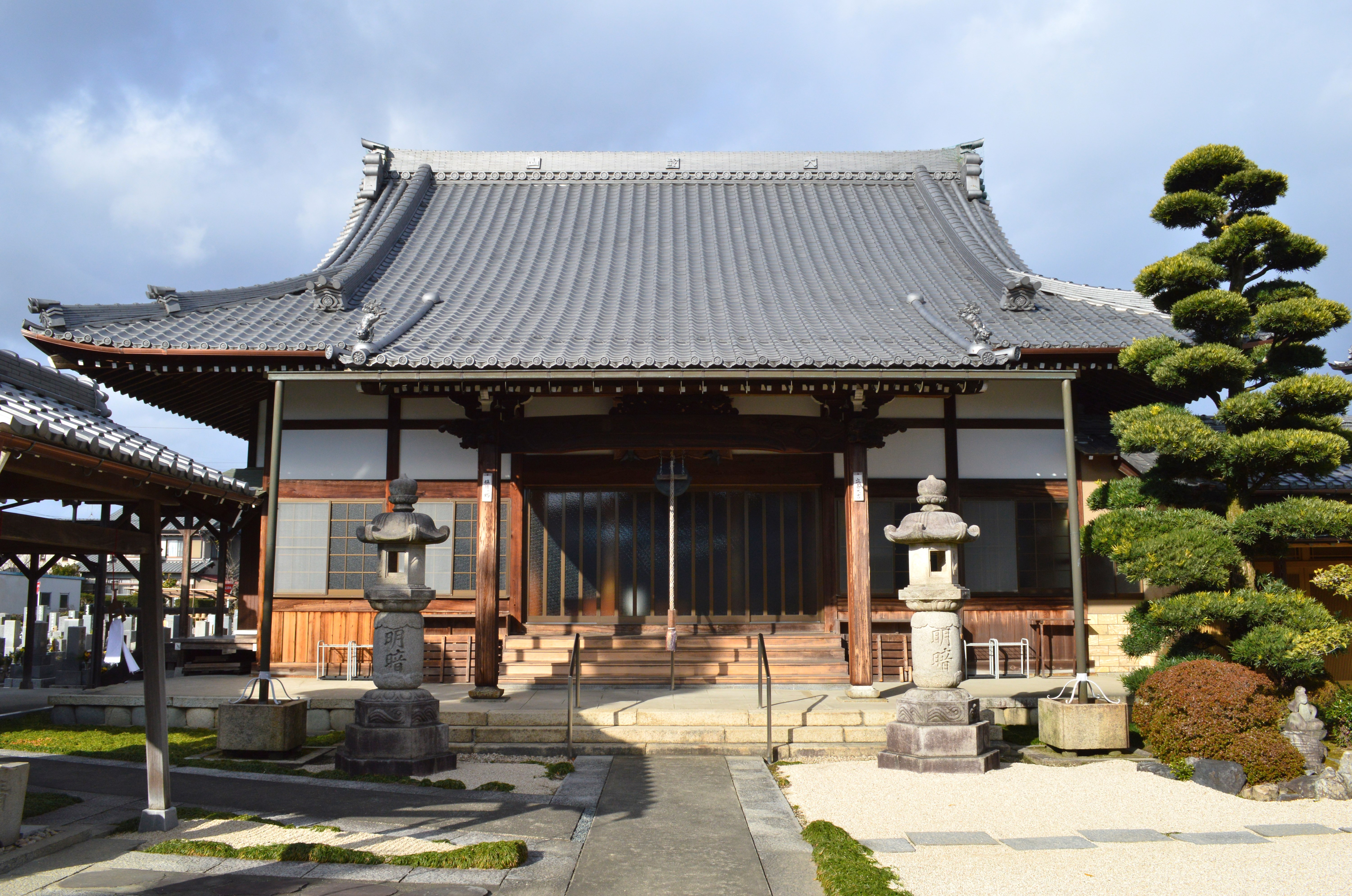 法華寺 (稲沢市) 本堂